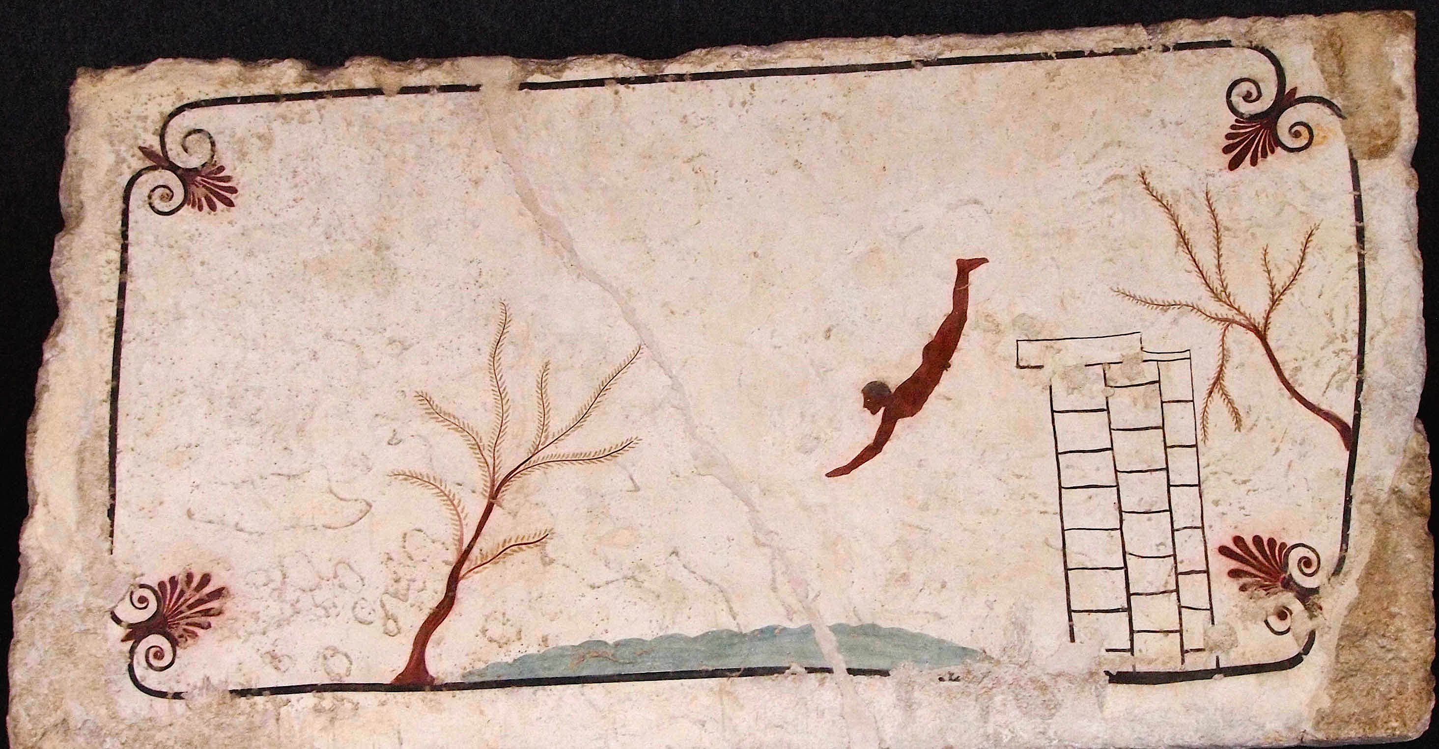 Museo Archeologico Nazionale di Paestum - MIBAC This is a photo of a monument which is part of cultural heritage of Italy.